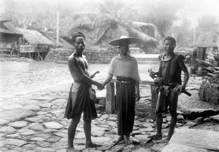 Negatief. Huwelijksplechtigheid in Zuid-Nias